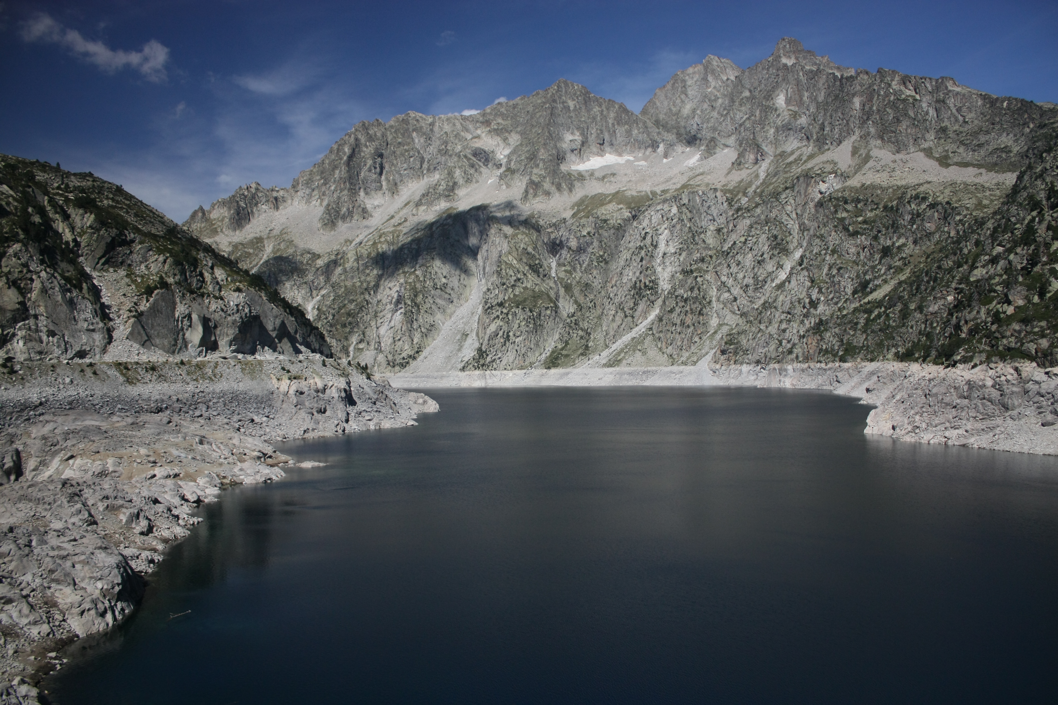 Le barrage de Cap de Long en basses eaux.